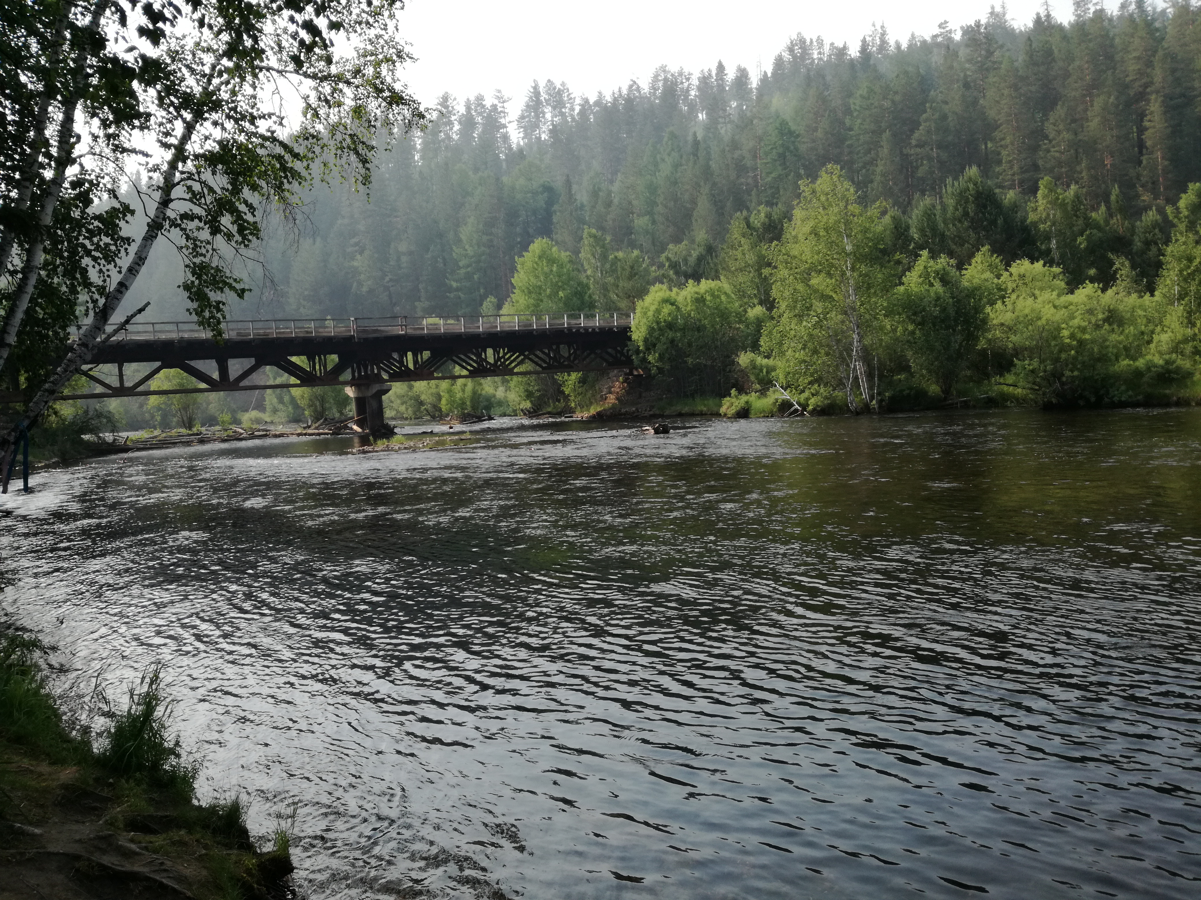 Река Хаим